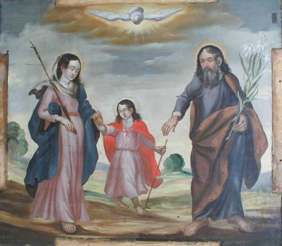 Святая Сям’я. Другая палова XVII ст. З брыгіцкага касцёла ў Гродне. Нацыянальны мастацкі музей Беларусі